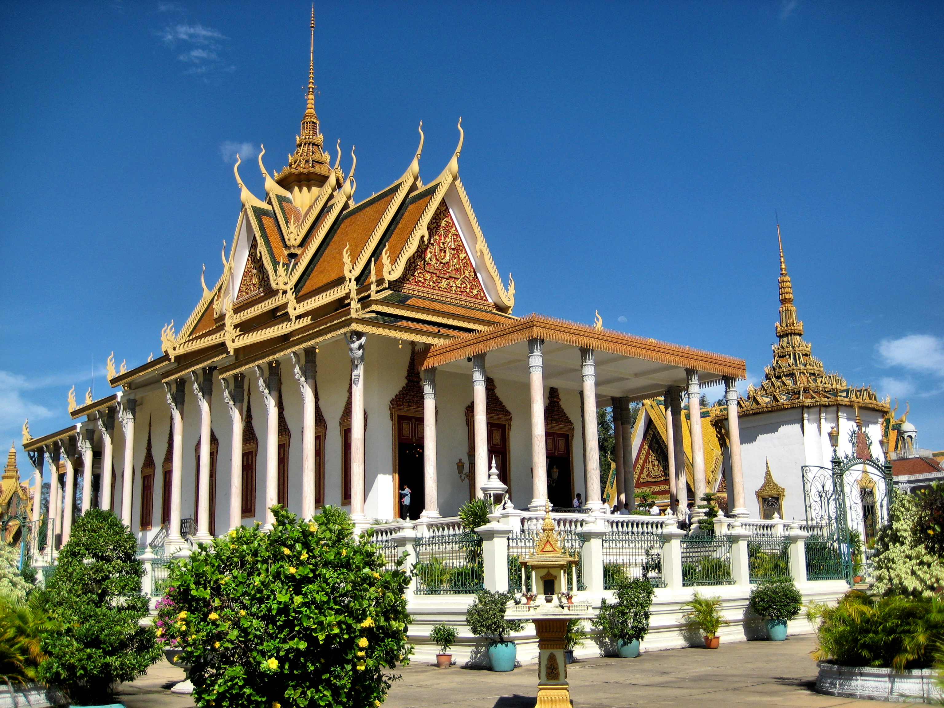 Silver Pagoda